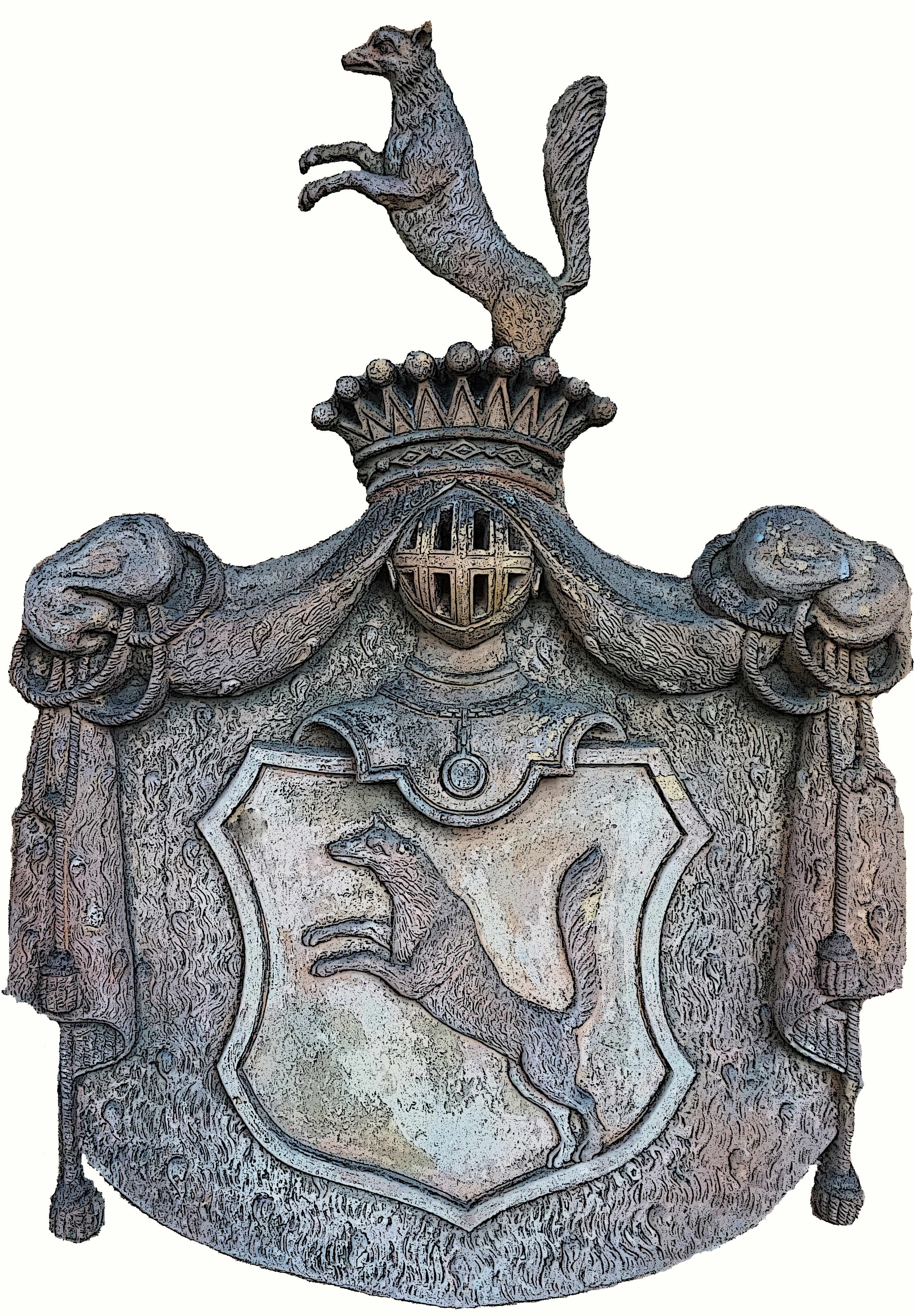 Das Wappen der Grafen von Voß - Buch (Auf der Grabstätte in Berlin Buch) In Silber ein roter springender Fuchs mit der Rute aufgerichtet. Der Schild ist goldumrandet. Ein roter Mantel, an der Innenseite mit Hermelinpelz ausgestattet. Auf einem Helm mit einer neunperligen Grafenkrone, ein wachsender Fuchs.